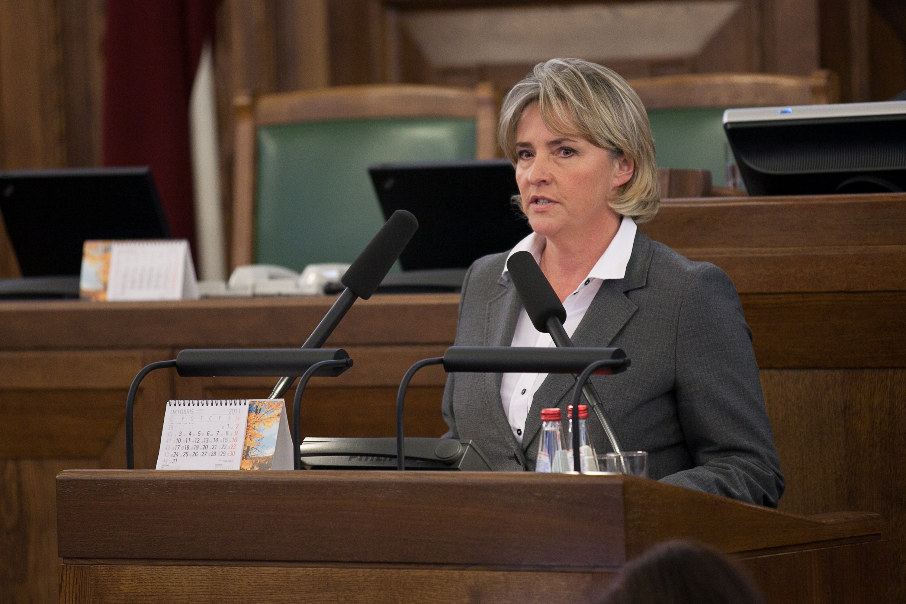 2011.gada 17.oktobris. Deputāte Iveta Grigule dod svinīgo solījumu. Foto: Ernests Dinka, Saeimas Kanceleja